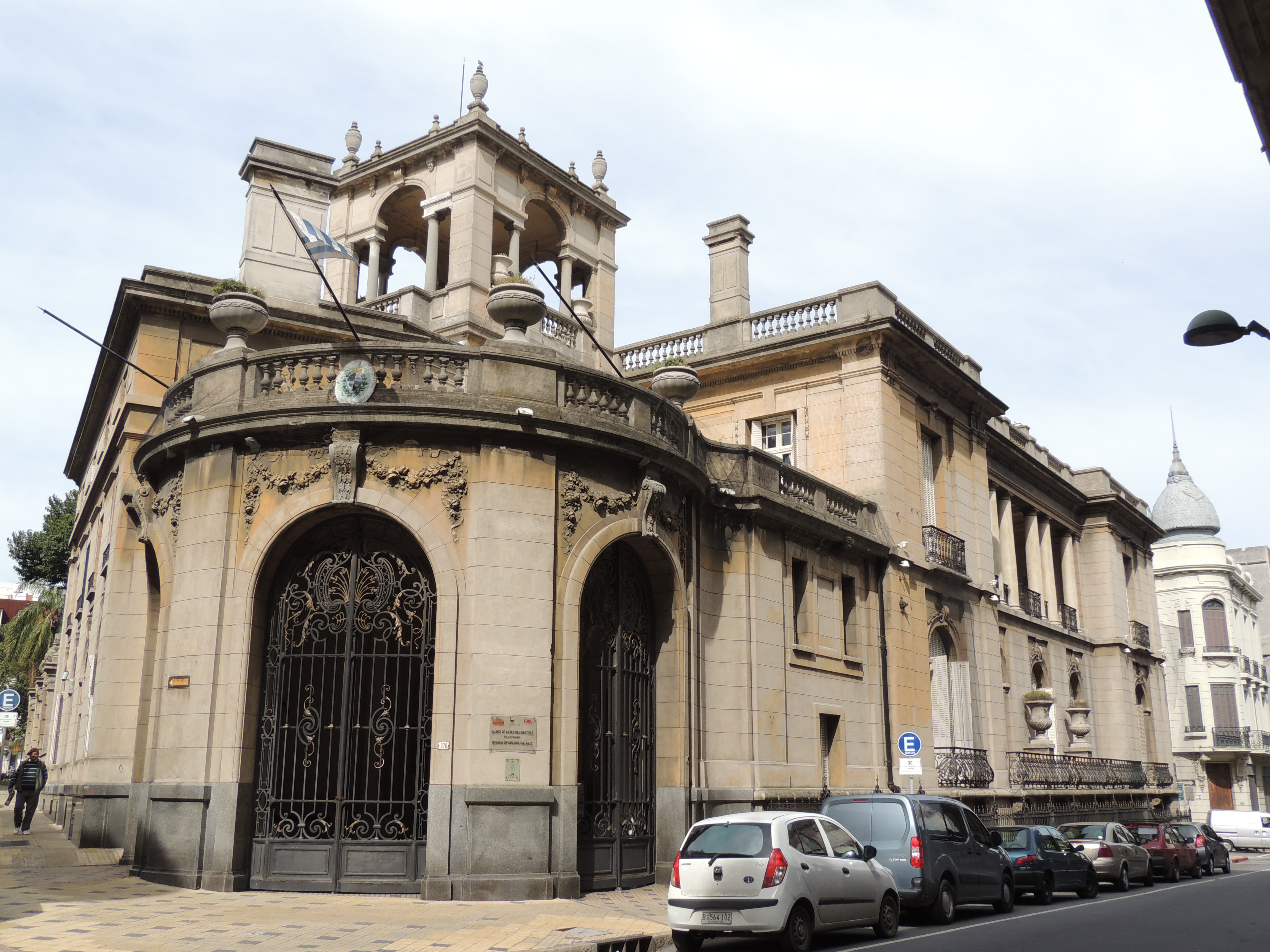 Palacio de don Félix Ortiz de Taranco. Ubicada en el departamento de Montevideo